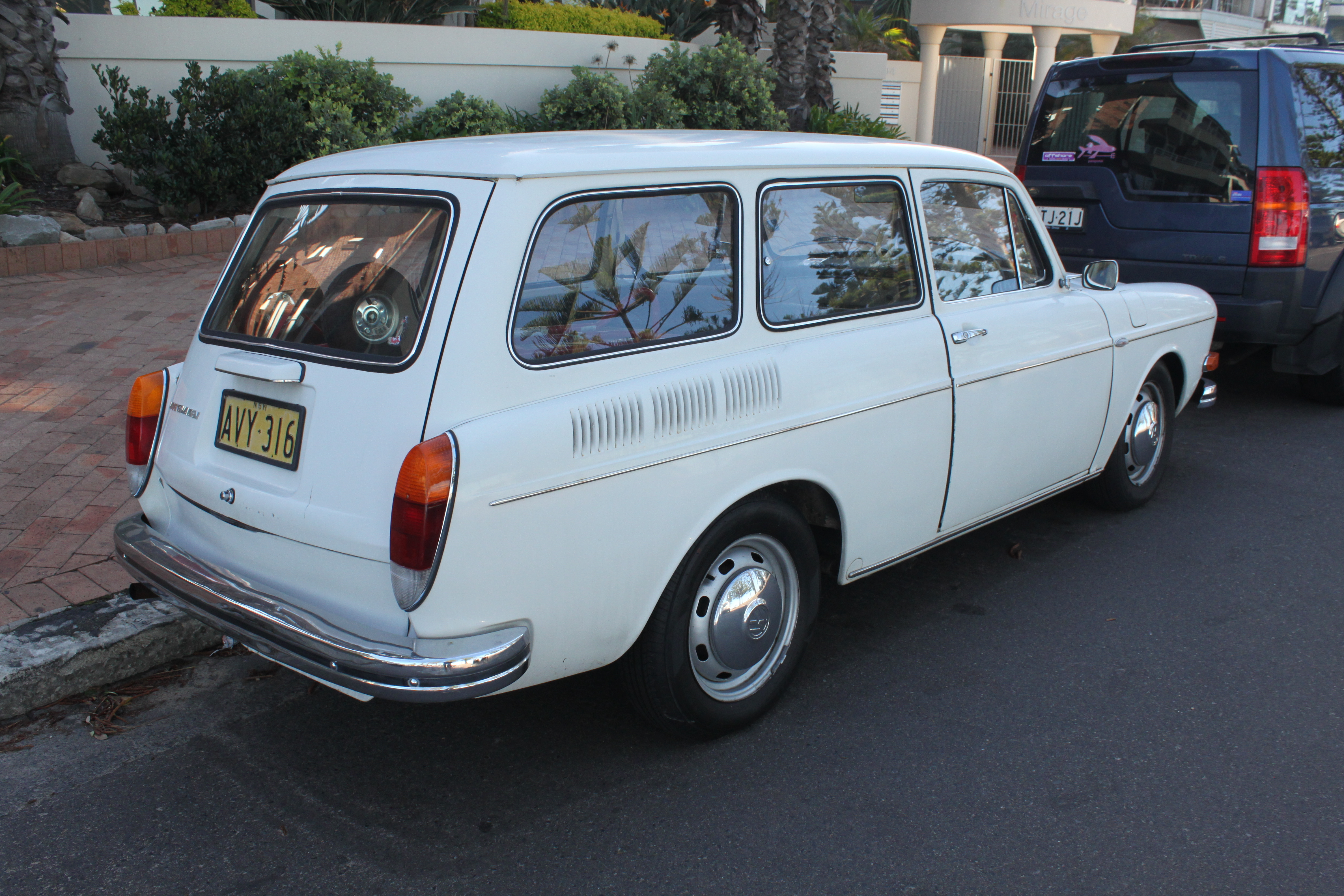 Volkswagen Type 3 Squareback